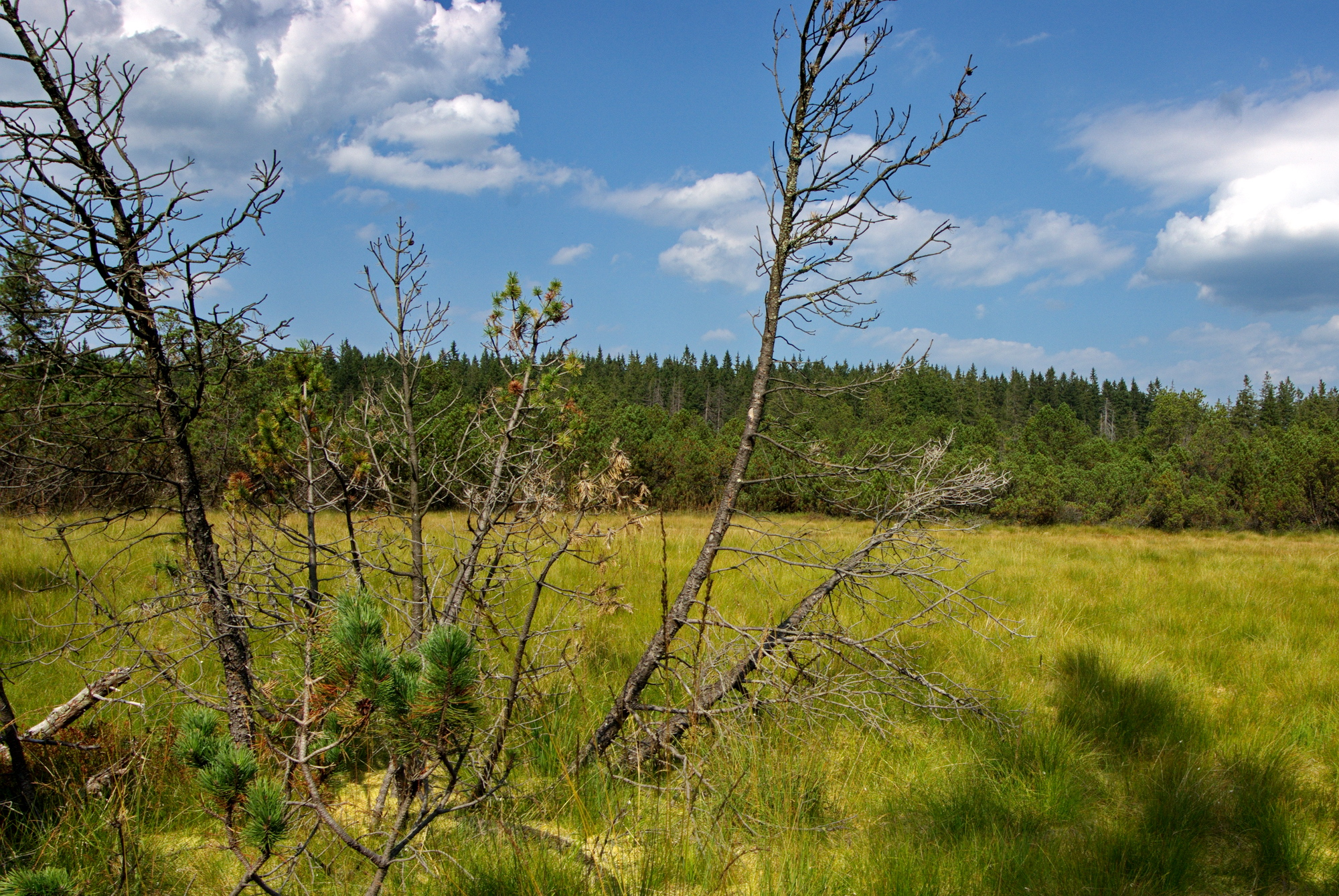 Přírodní rezervace Malé Jeřábí jezero u zaniklé obce Jelení, na státní hranici s Německem, Krušné hory, okres Karlovy Vary